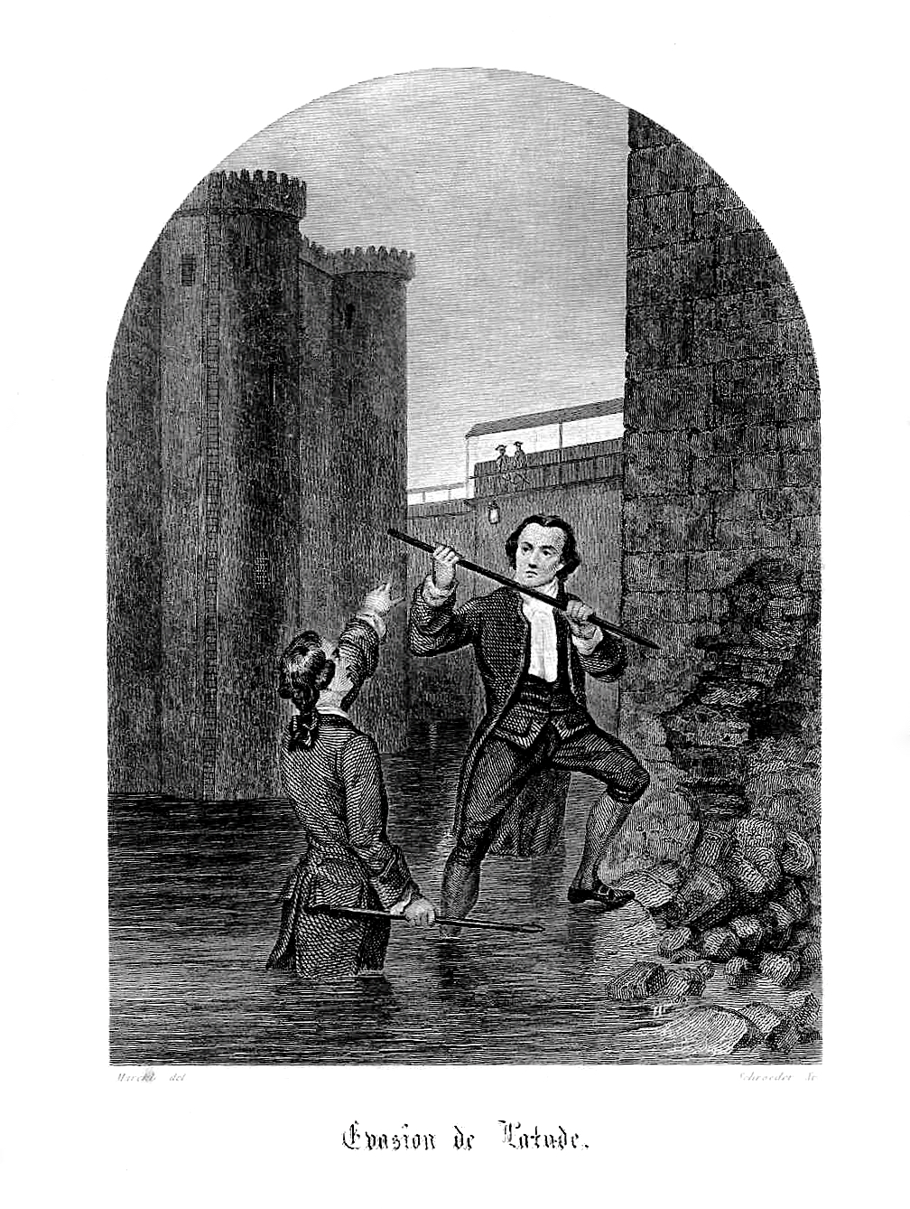 Évasion de Latude de la Bastille